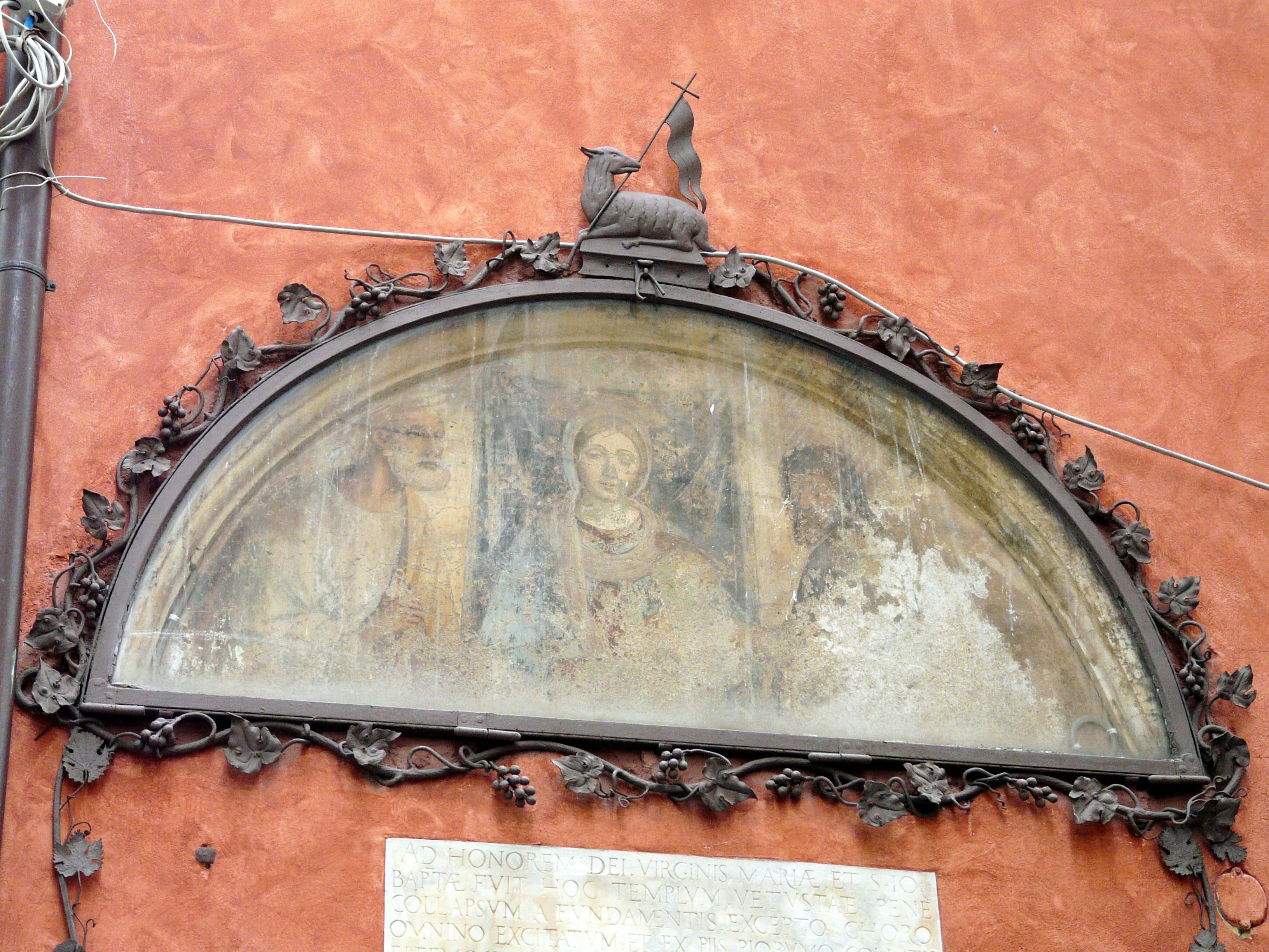 Lunetta della facciata della chiesa di San Giovanni Battista, Chiavari, Italia